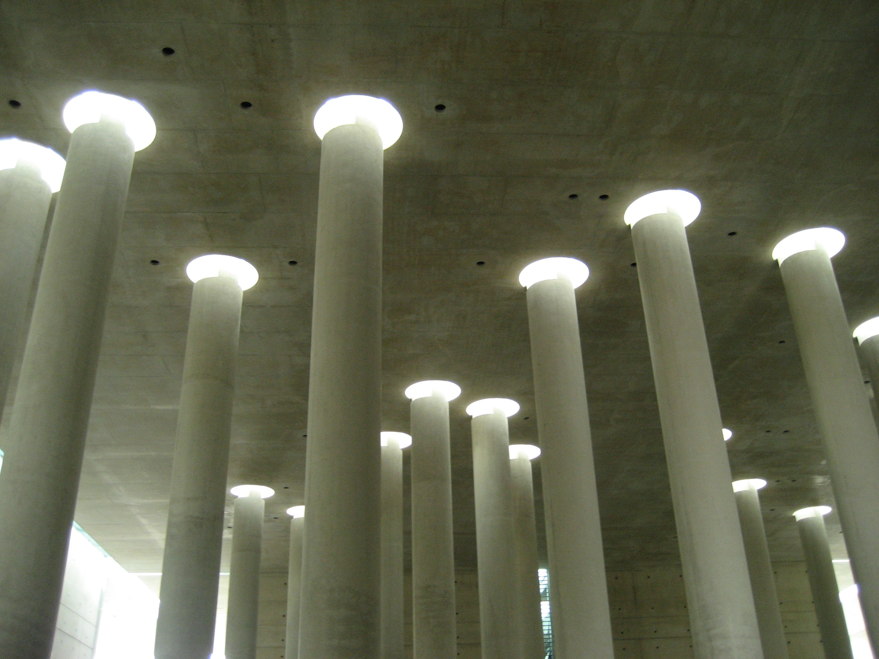 Krematorium Blumenweg, interior